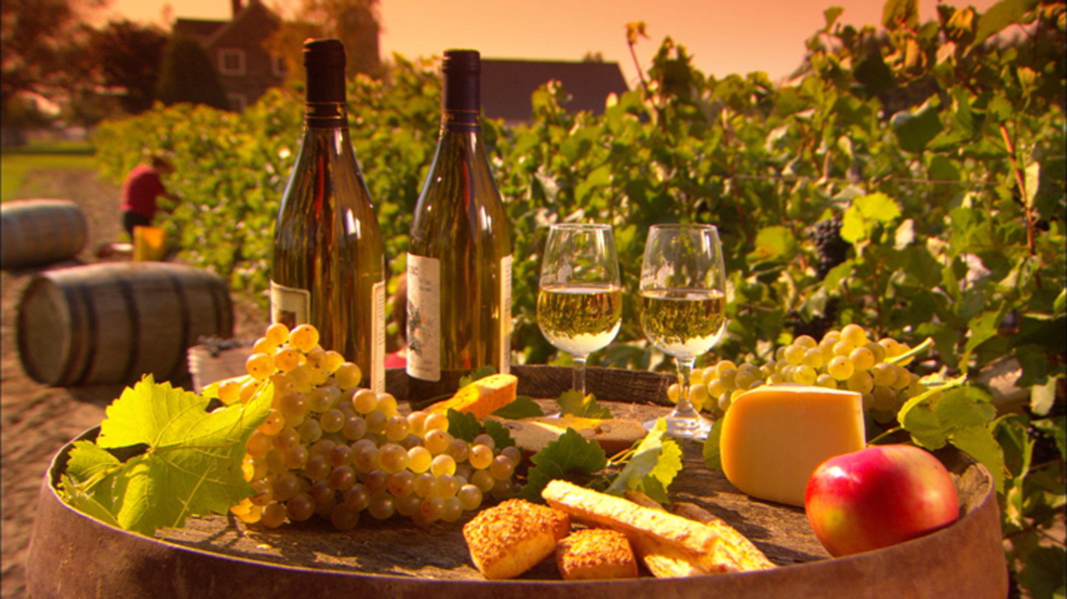 Les produits de la région de Saint-Jean-sur-Richelieu